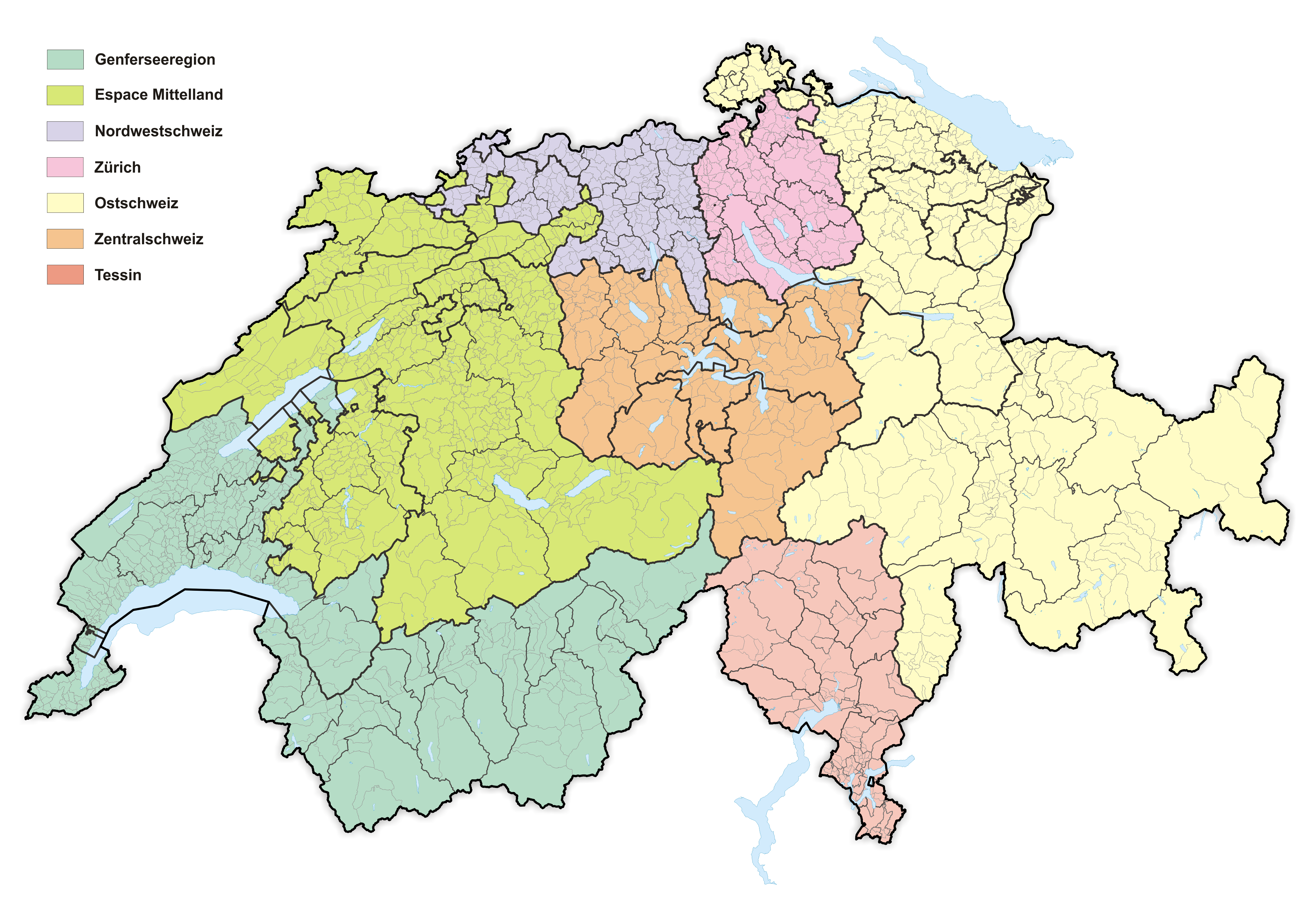 Grossregionen der Schweiz